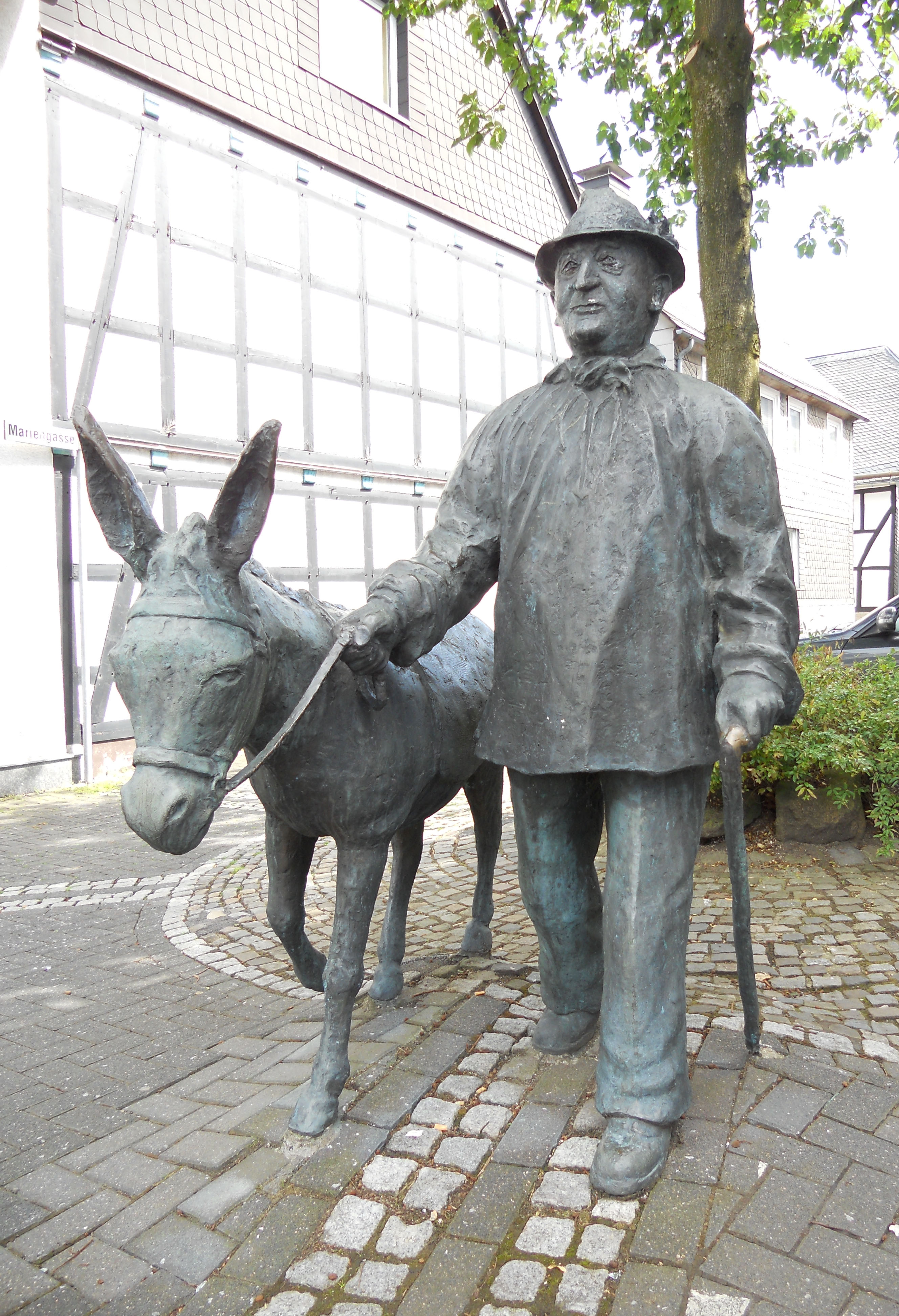 Theodor Isenberg mit Huberta (illegitimes Wappentier der Stadt), Bronzeskulptur in Brilon in der Friedrichstraße